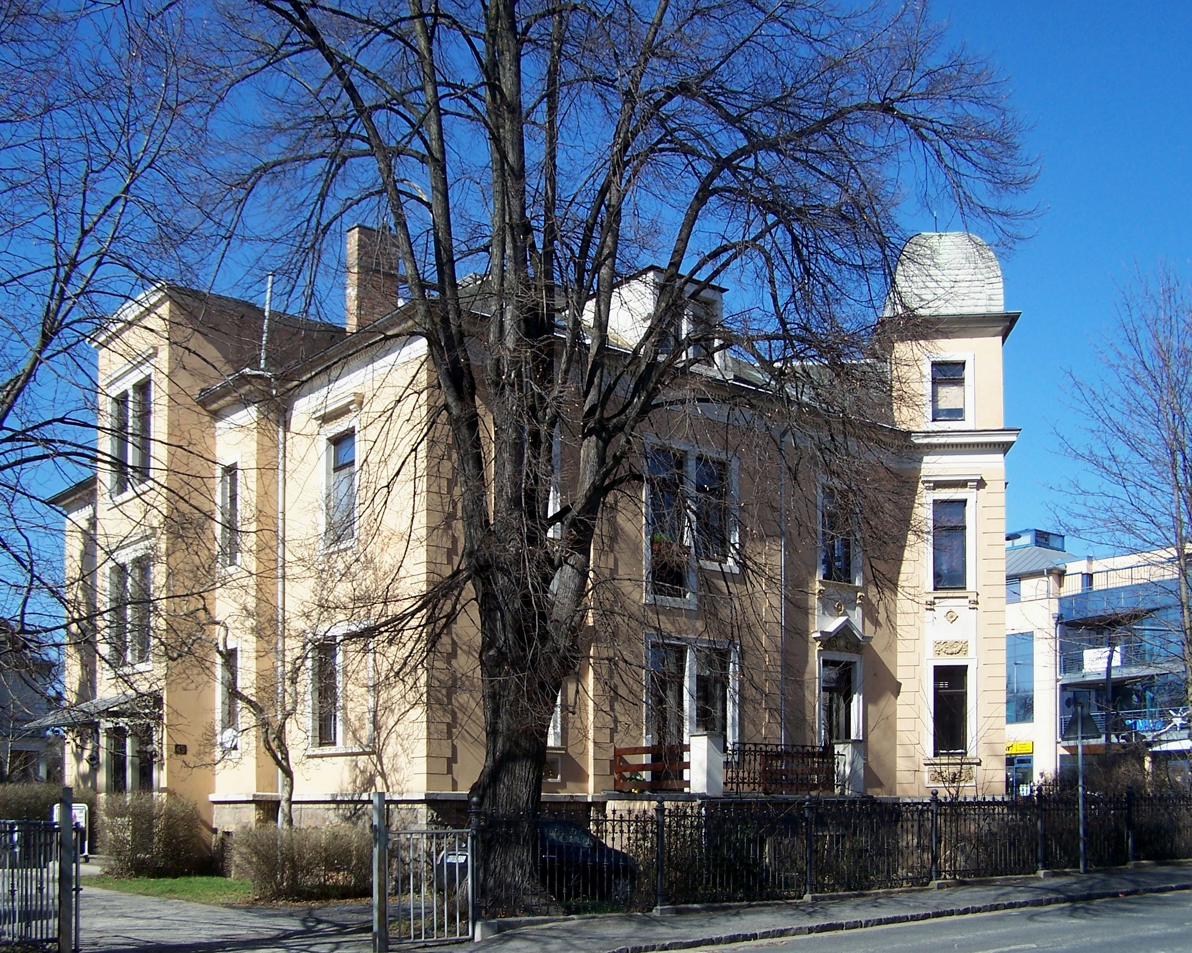 Wasastr. 49 in Radebeul